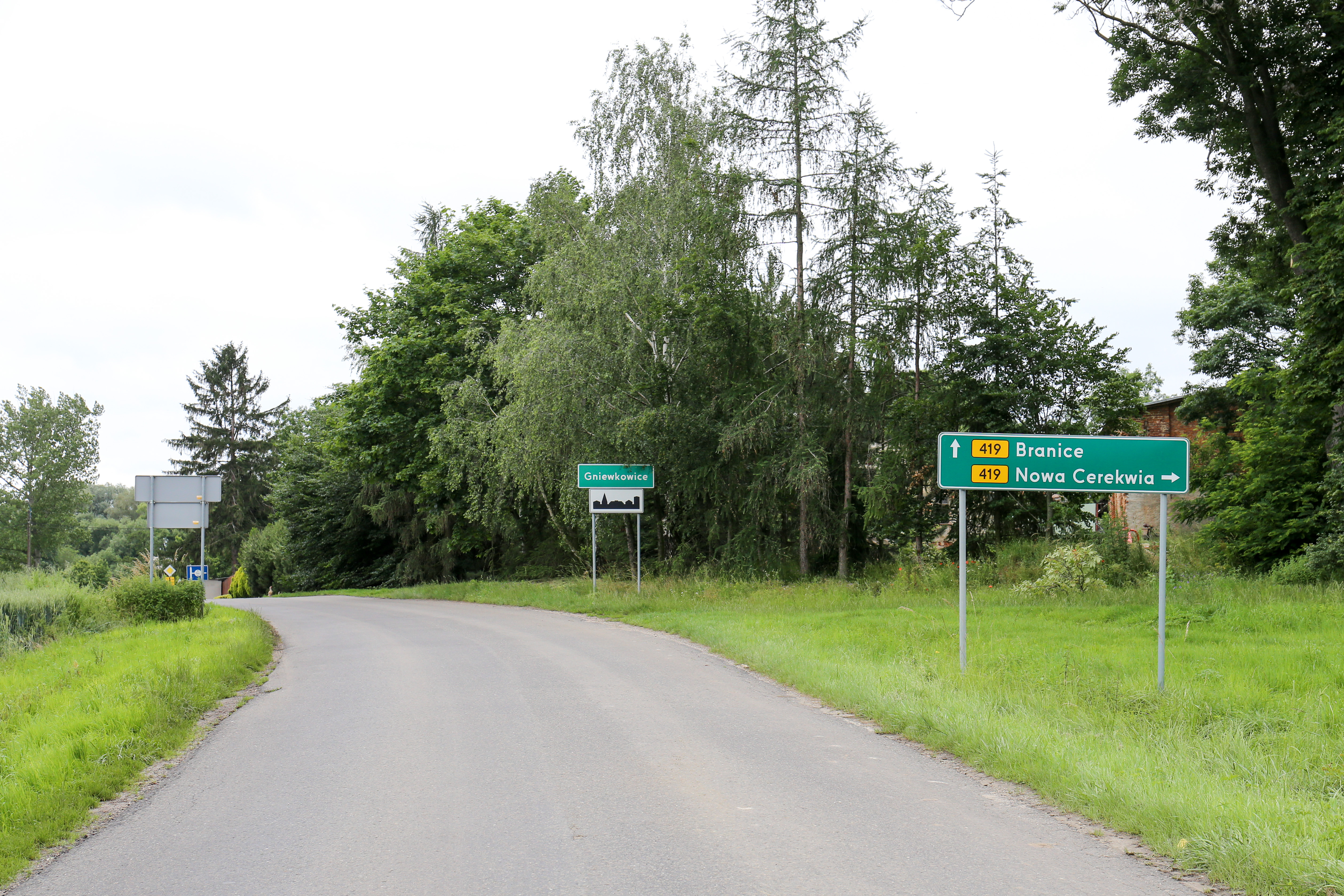 Gniewkowice - wieś w Polsce położona w województwie opolskim, w powiecie głubczyckim, w gminie Kietrz.